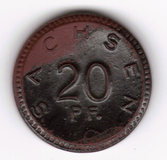 Es gab keine glasierte Münzen. Eine Manipulation.